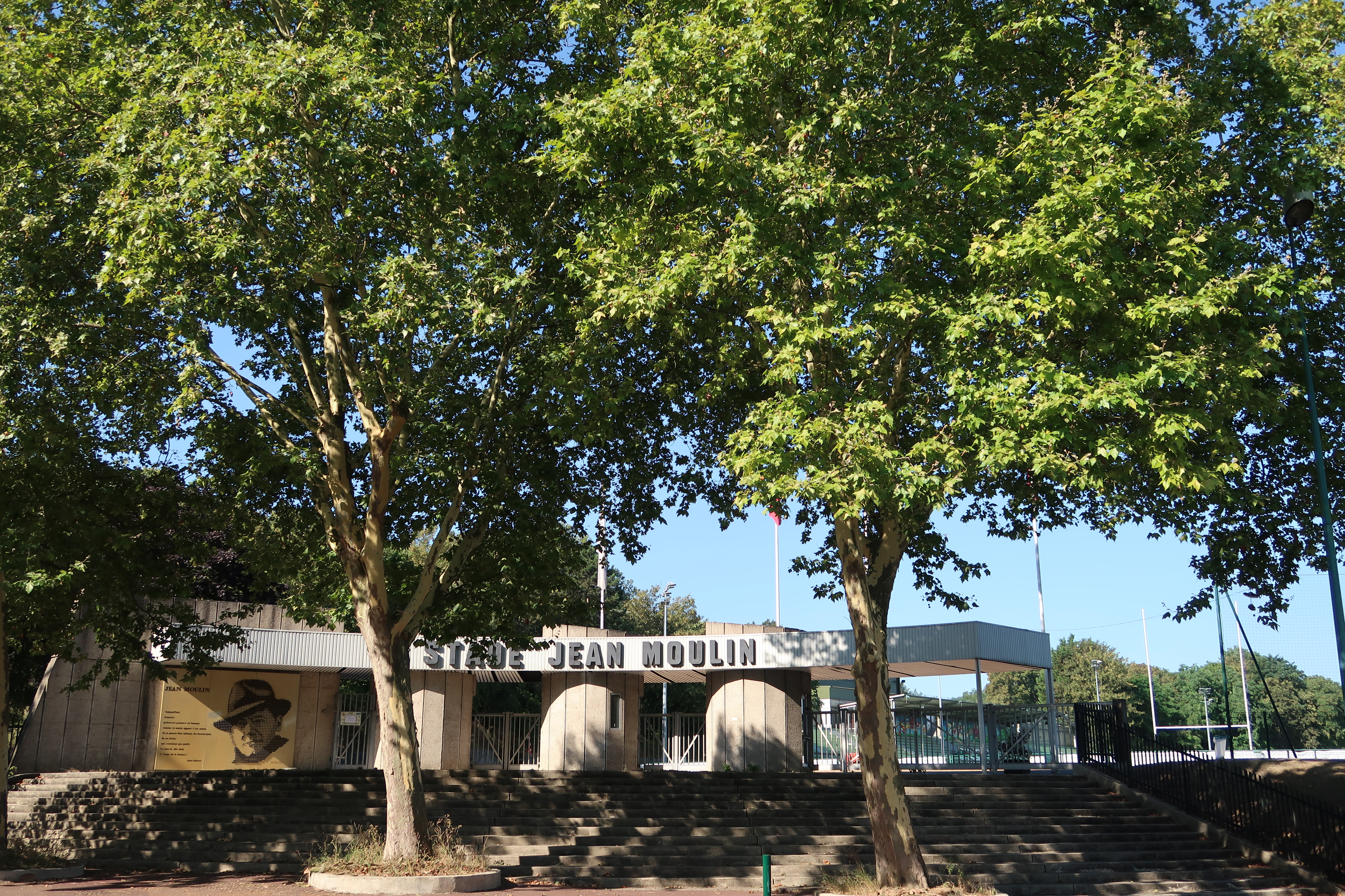 Stade Jean-Moulin à Suresnes (Hauts-de-Seine).